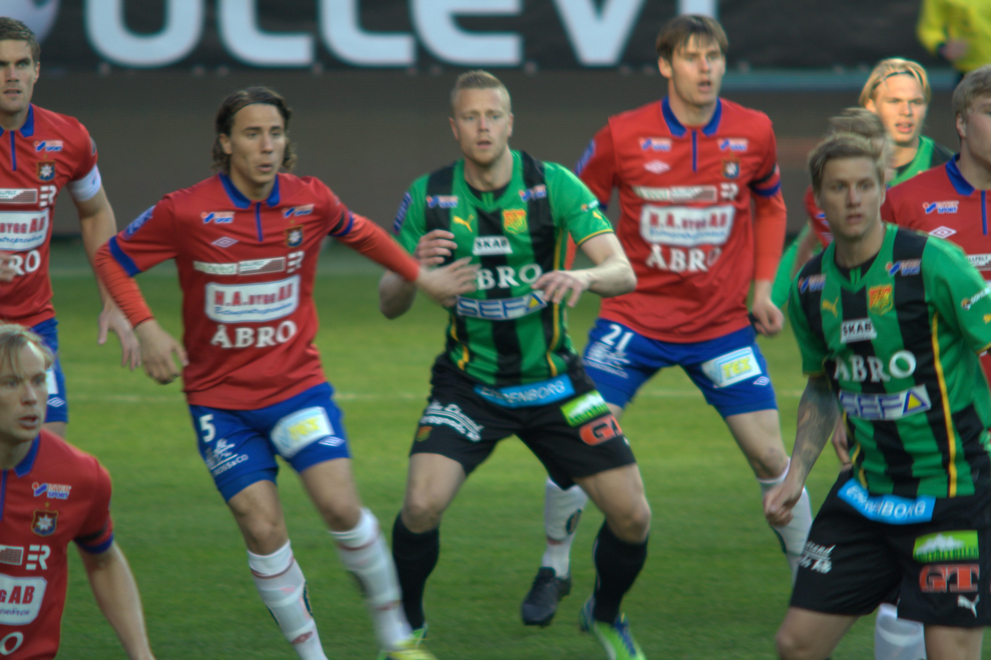 GAIS player Björn Andersson.